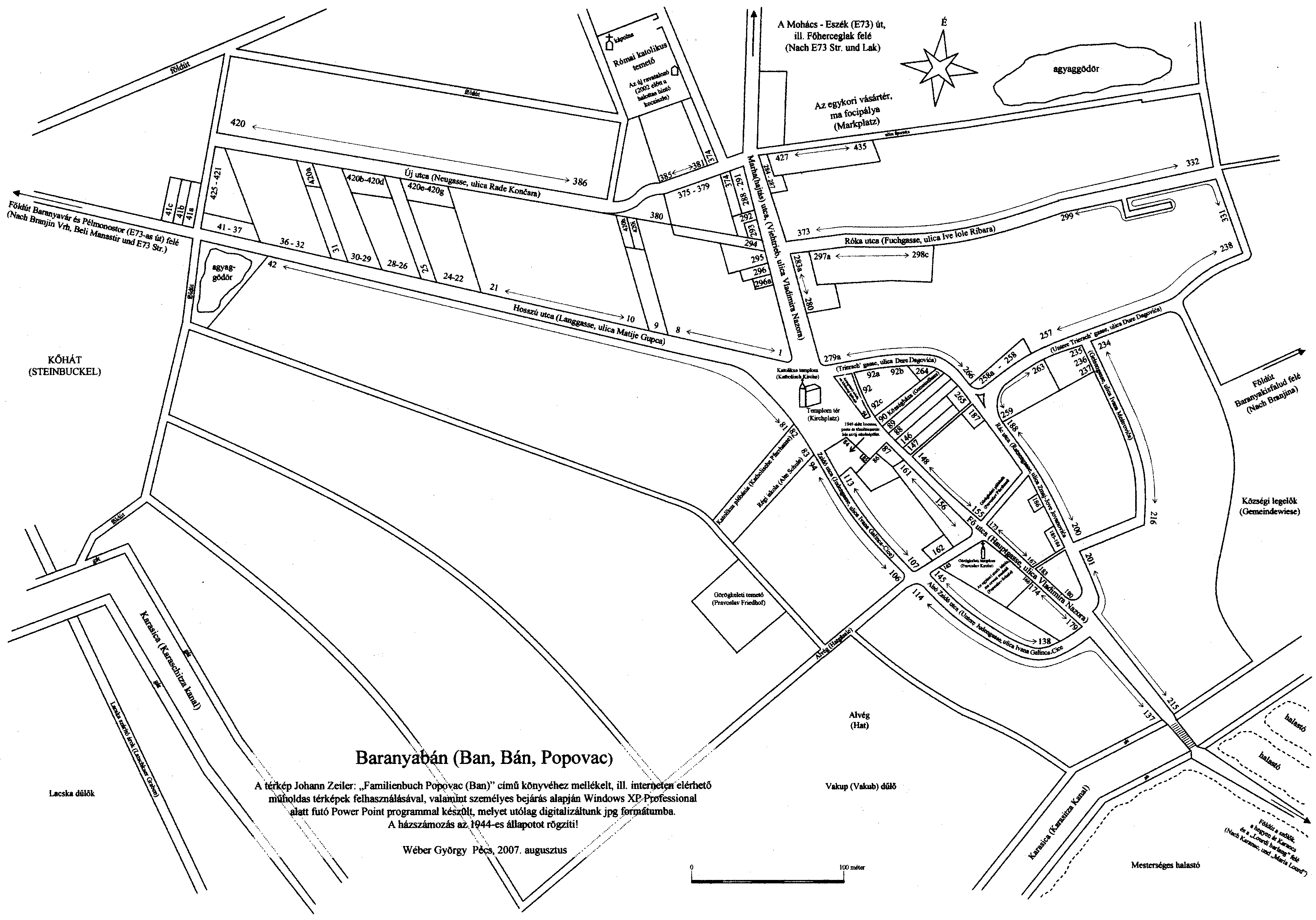 A vonalrajzos térkép Microsoft Power Poit programmal készült, melynek papírnyomatát digitalizáltam. A térkép Baranyabán települést ábrázolja.